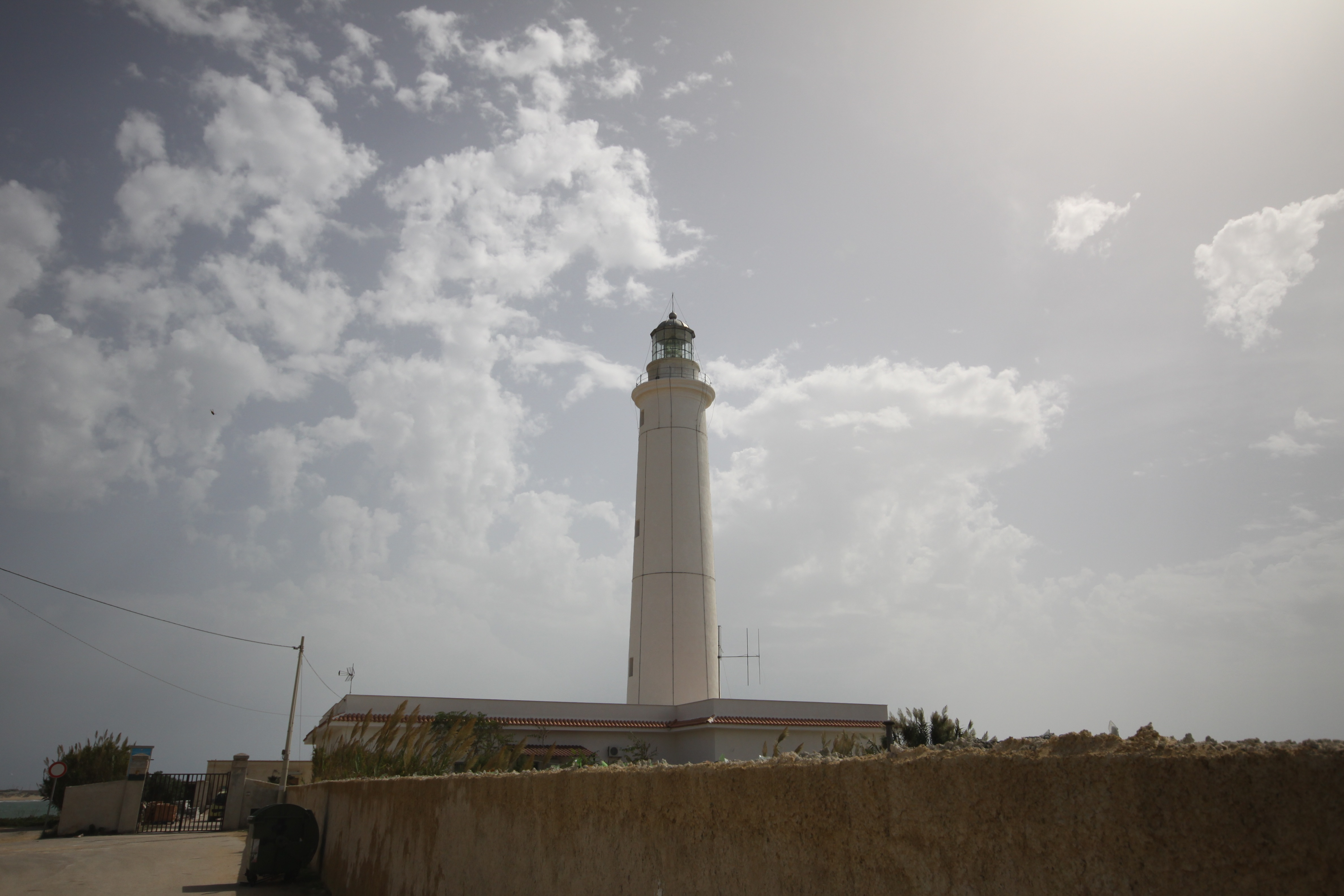 Leuchtturm in Torretta Granitola (Campobello di Mazara)